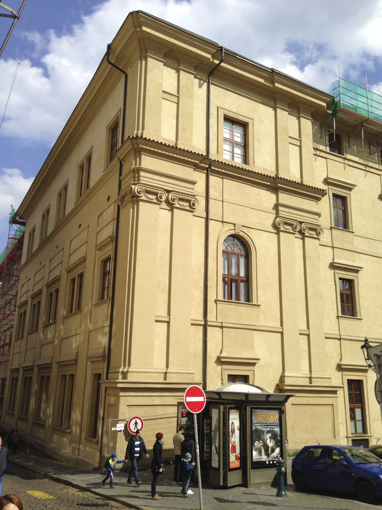 Profesní dům jezuitů na Malostranském náměstí, bývalý kostel sv. Václava.